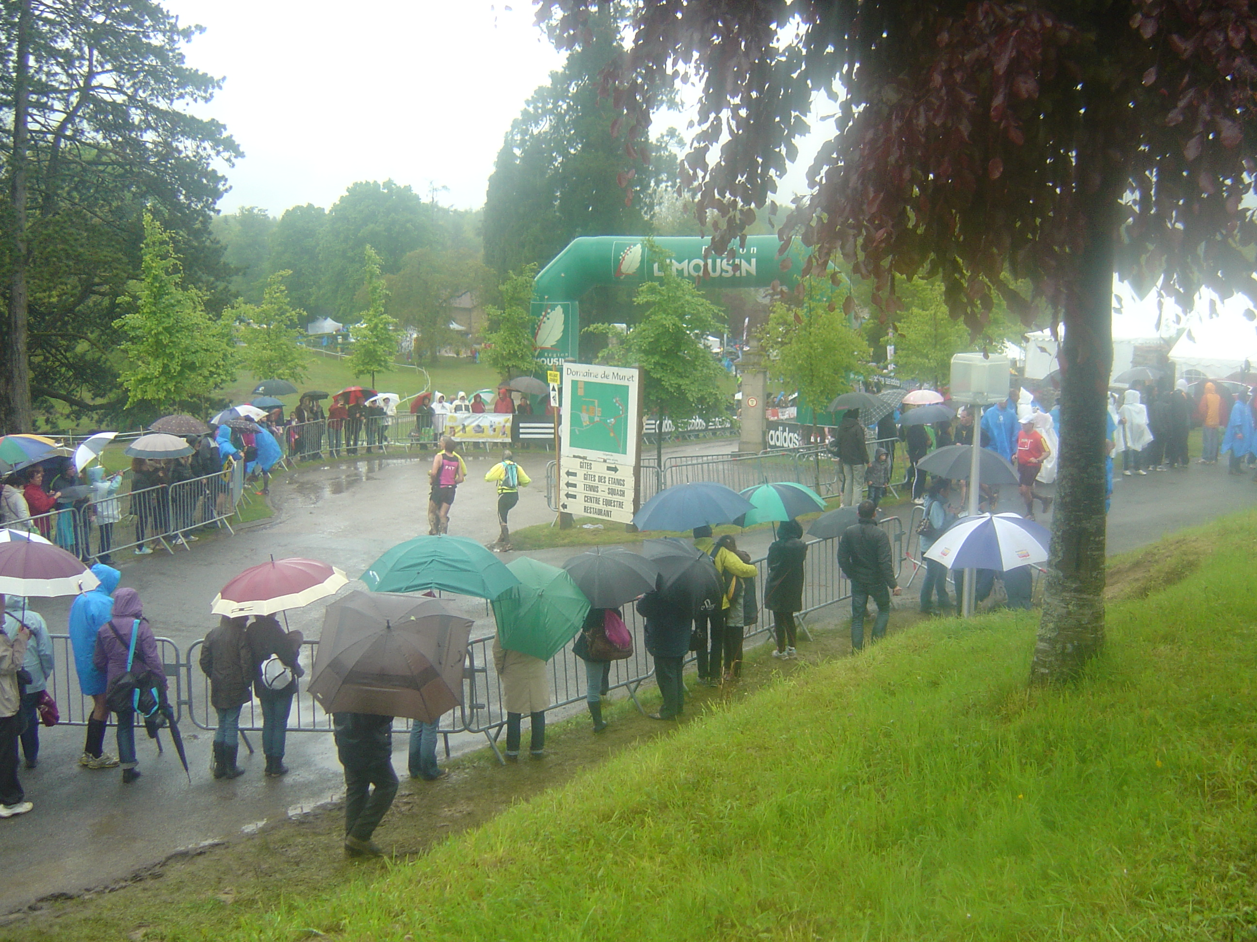 Dernier virage avant l'arrivée sur la course des Gendarmes et Voleurs de Temps 2013